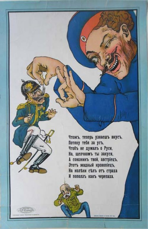 Музей: Гродзенскі дзяржаўны гісторыка-археалагічны музей Тып: выяўленчыя крыніцы Від: графіка прыкладная Прадметнае імя: плакат Назва/аўтарская назва: сатырычны Калектыўныя аўтары: Фабрыка твораў графічнага мастацтва, літаграфія, друкарня А.Ф.Постнікава, Масква, Цветны бульвар, 26; Матэрыялы: папера; Тэхналогіі стварэння: літаграфія каляровая; друк; Дата стварэння: 1914 г. Месца стварэння: Расійская Імперыя, Масква Памеры: 51,5 х 33 см